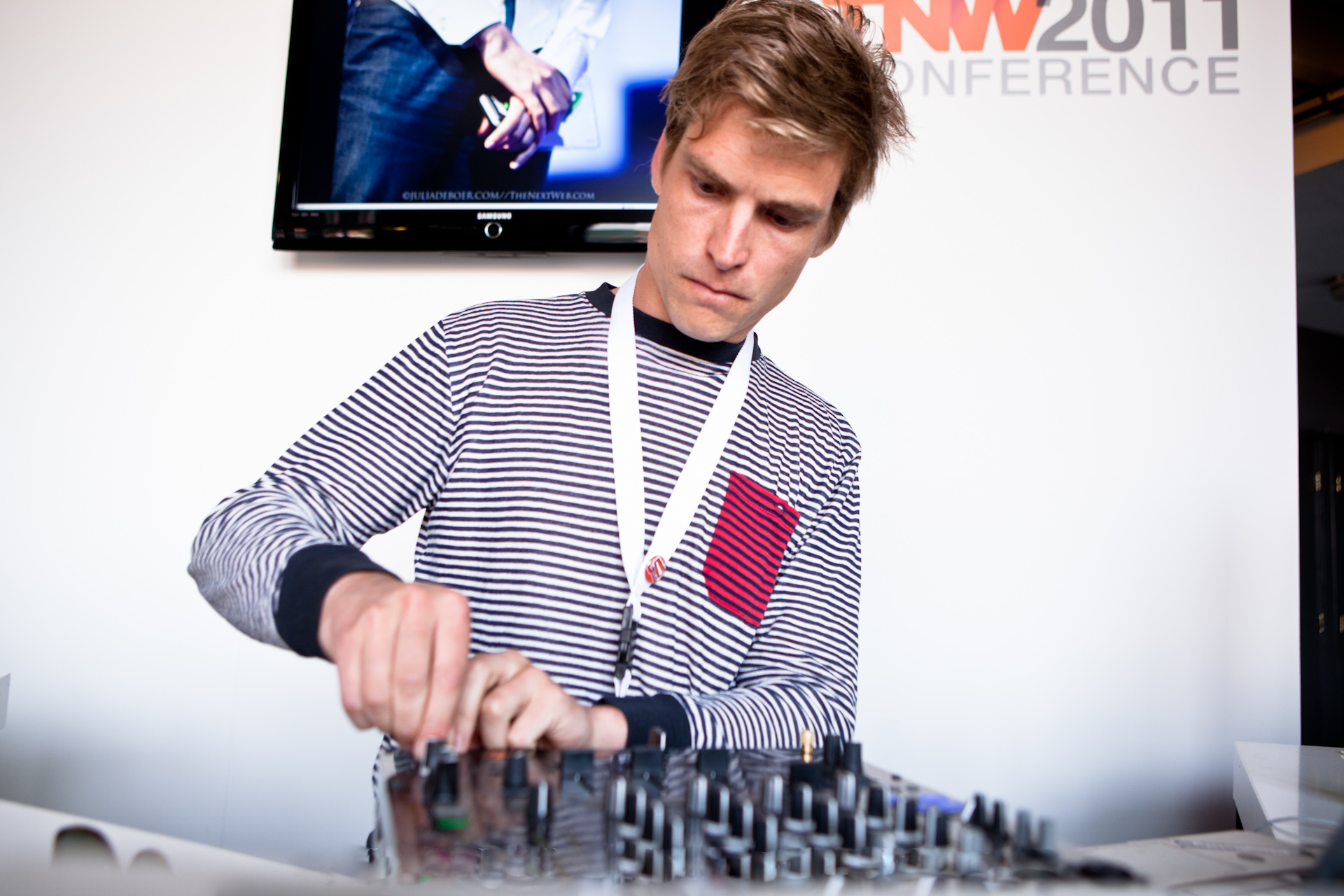 TNW2011